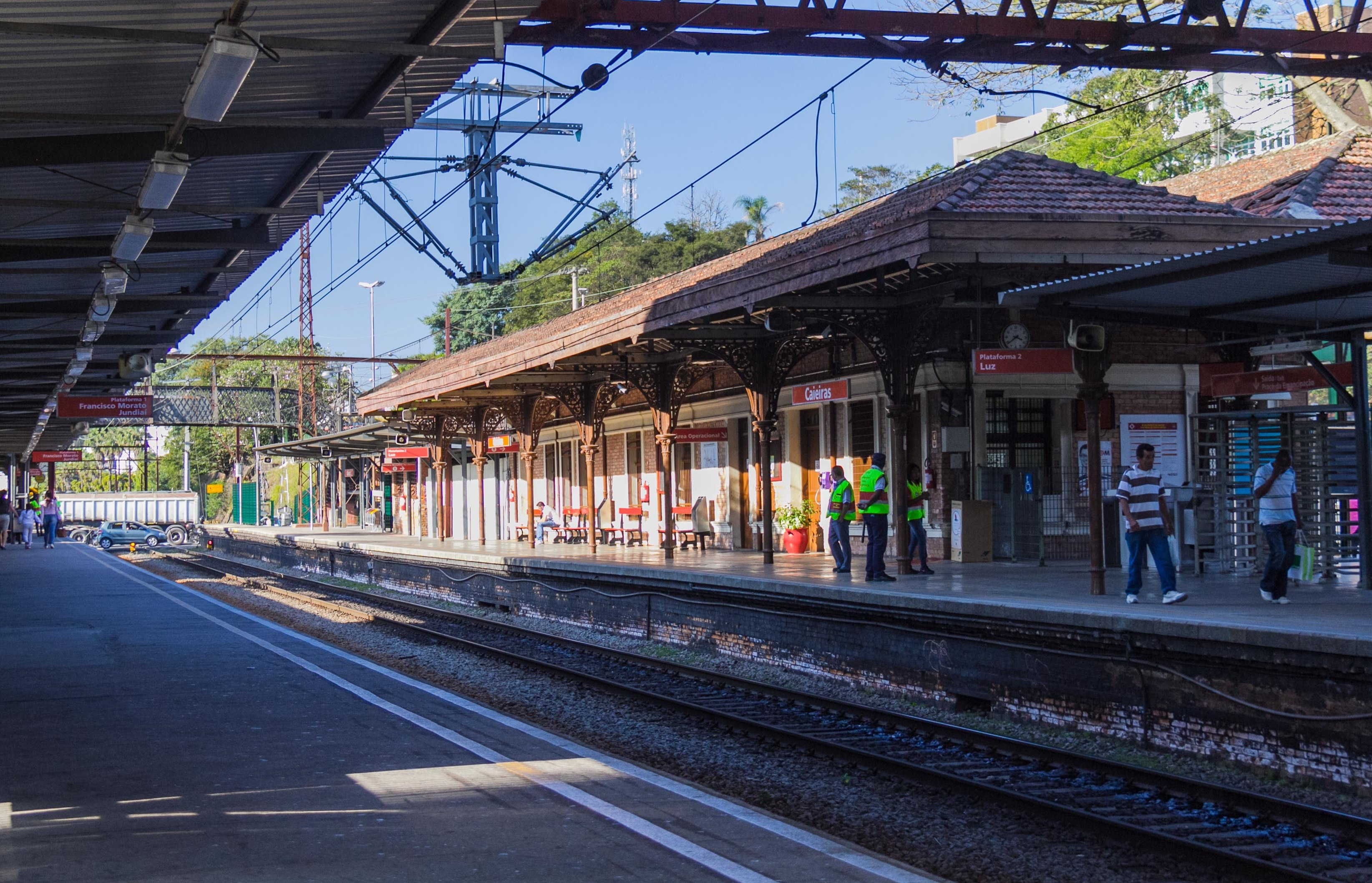 Estaçao Ferroviaria de Caieras,sp,contruida em 1883 pelos ingleses da Sao Paulo Railway depois Santos/Jundiai.